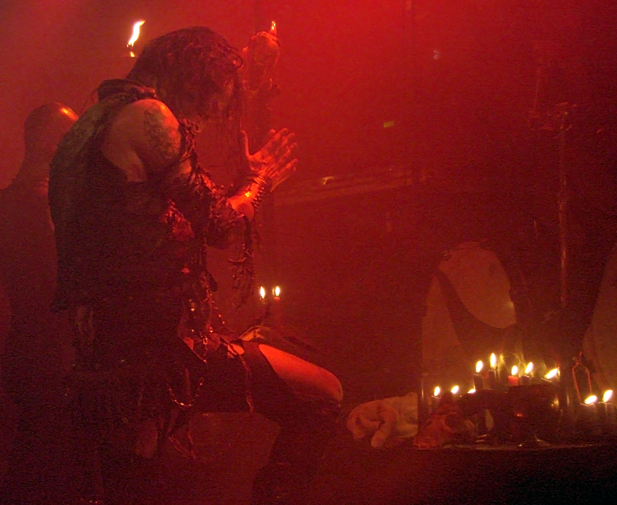 Watain à Paris, le 4 Octobre 2010. Erik Danielsson devant l'autel, au début du set.